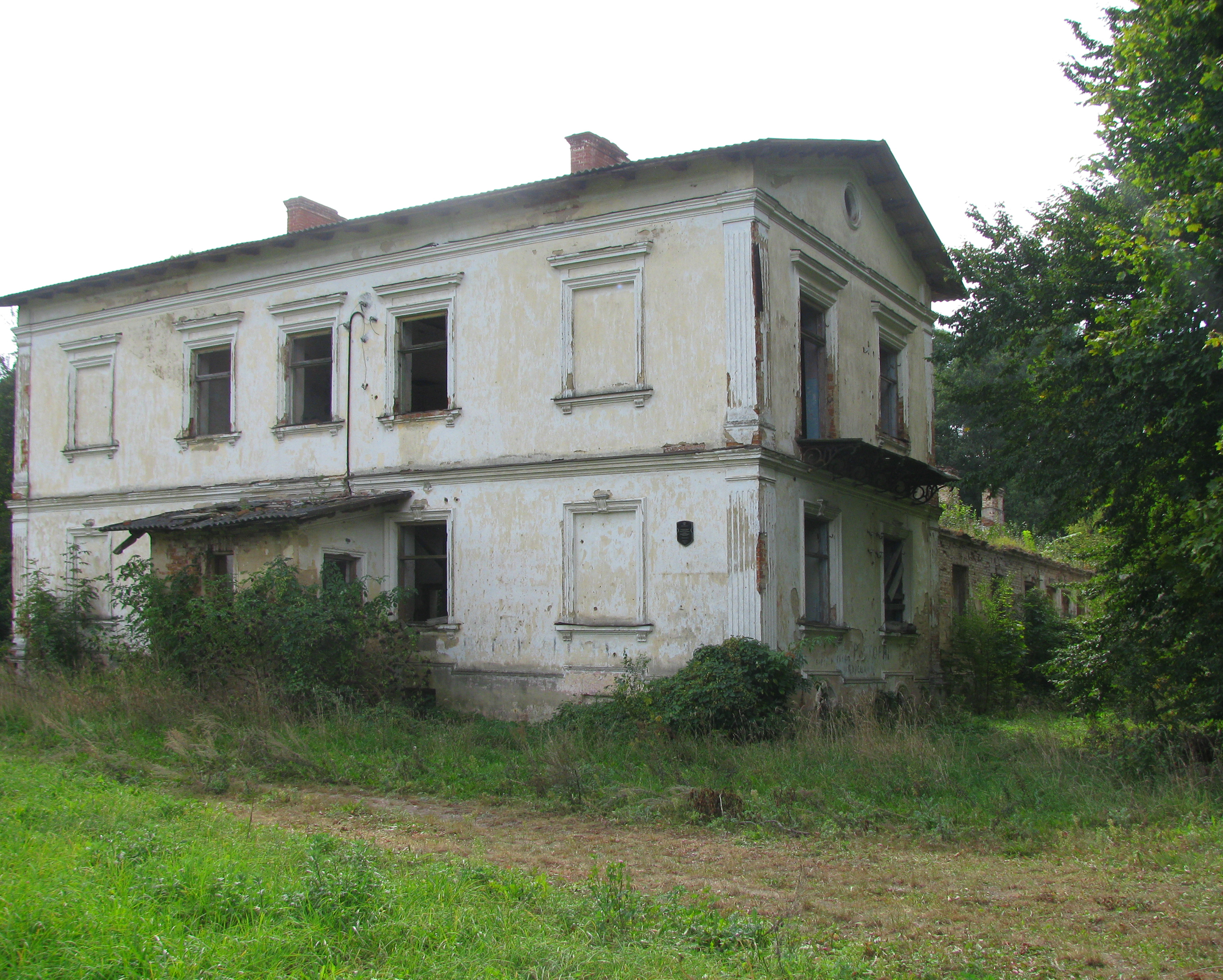 Беларуская (тарашкевіца): Рэшткі сядзібна-паркавага комплексу. в. Каштанаўка This is a photo of Belarusian heritage monument. Reference number: 113Г000614 ( WLM)